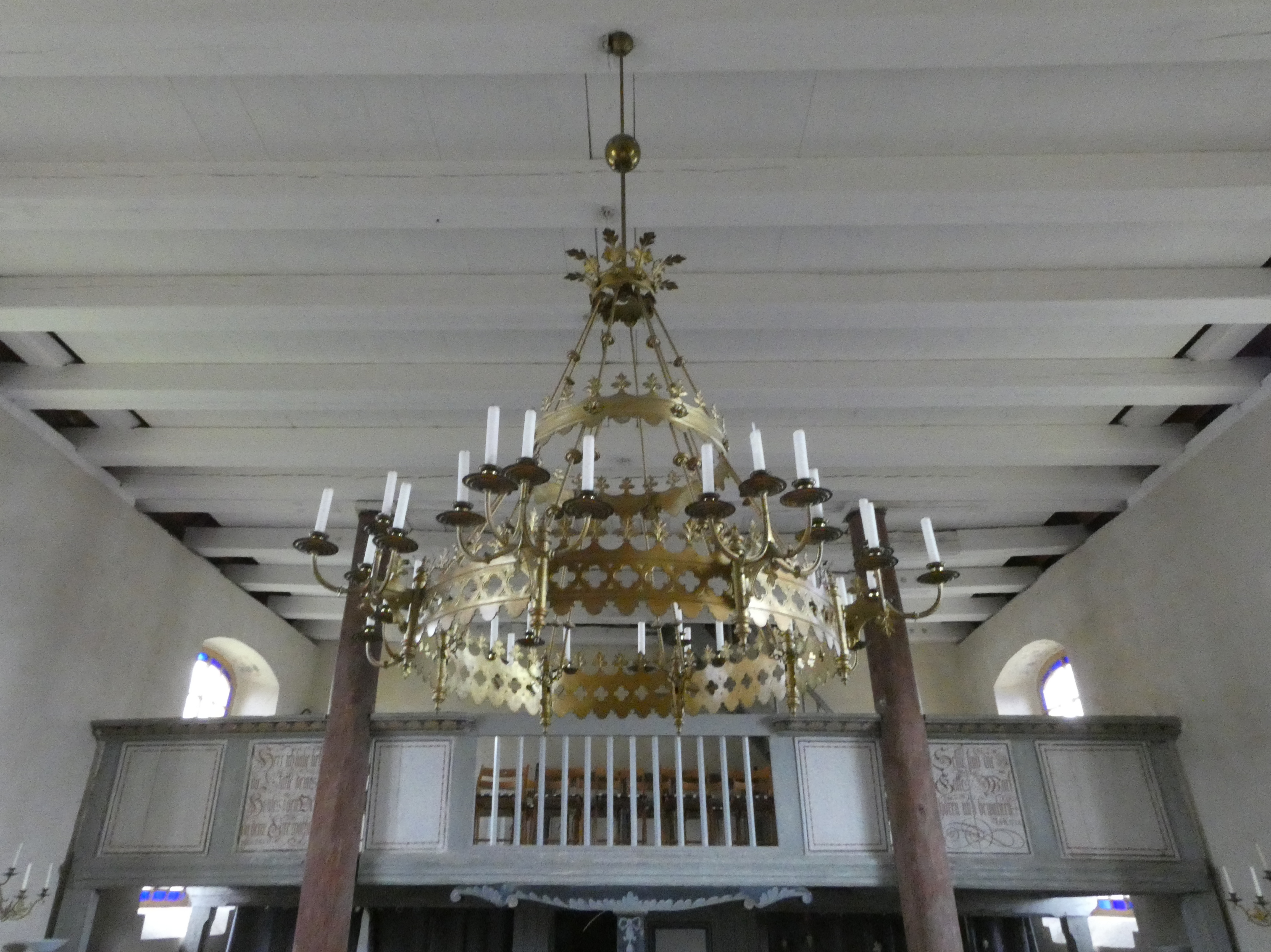 Dorfkirche Saaringen innen, Kronleuchter und Westportal